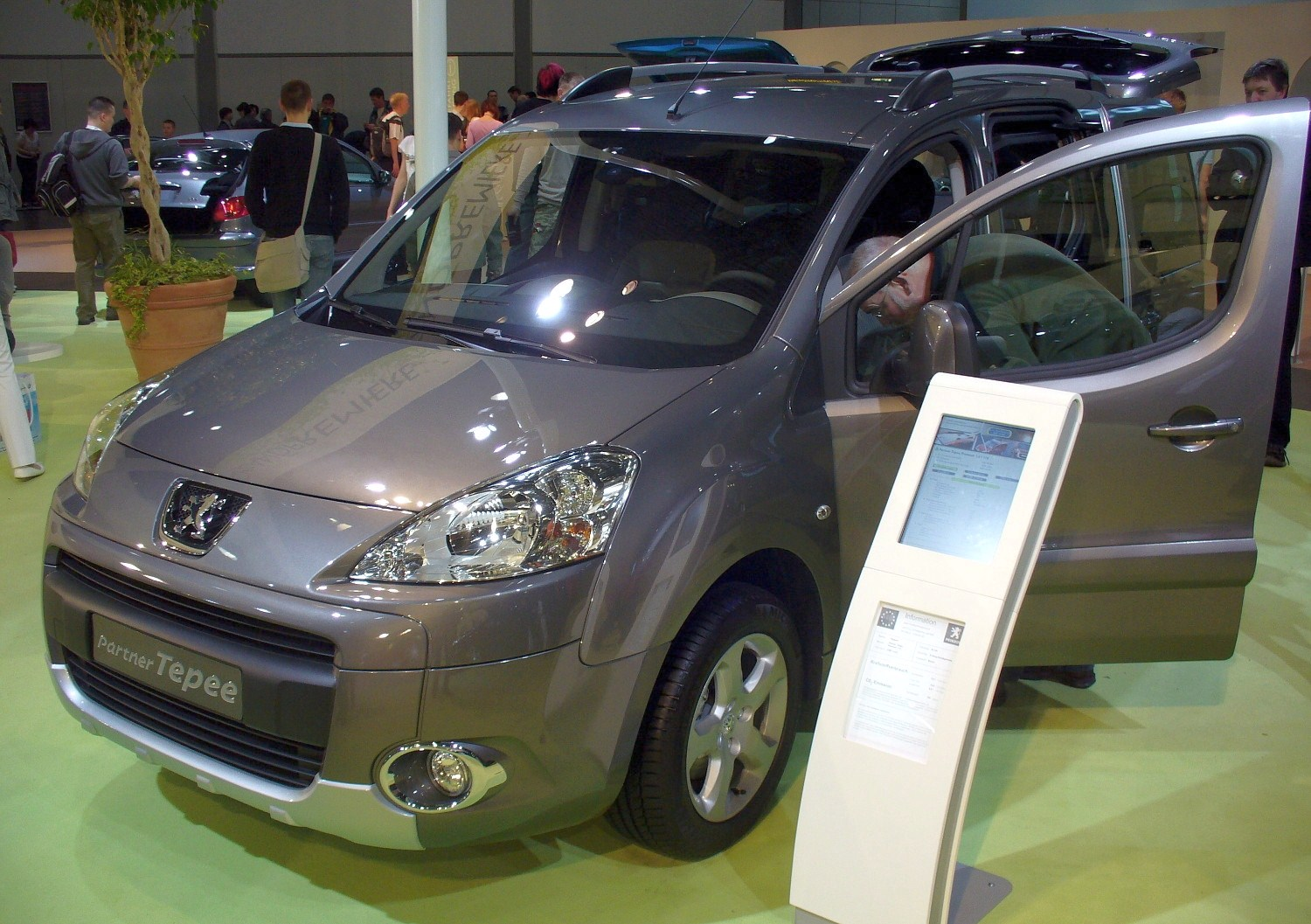 Peugeot Partner Tepee.